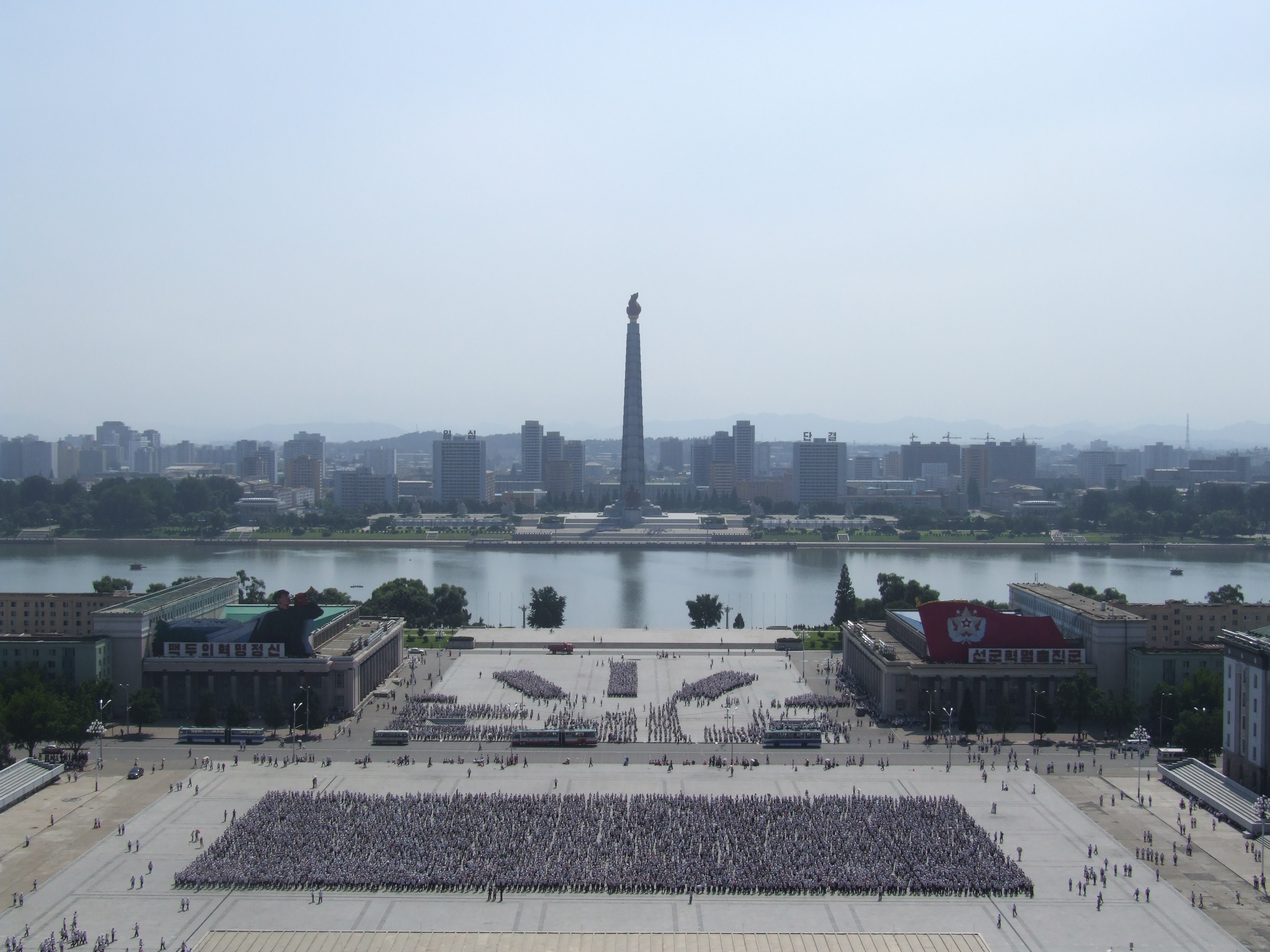 Kinder proben einen Fackelmarsch auf dem Kim-Il-sung-Platz in Pjöngjang